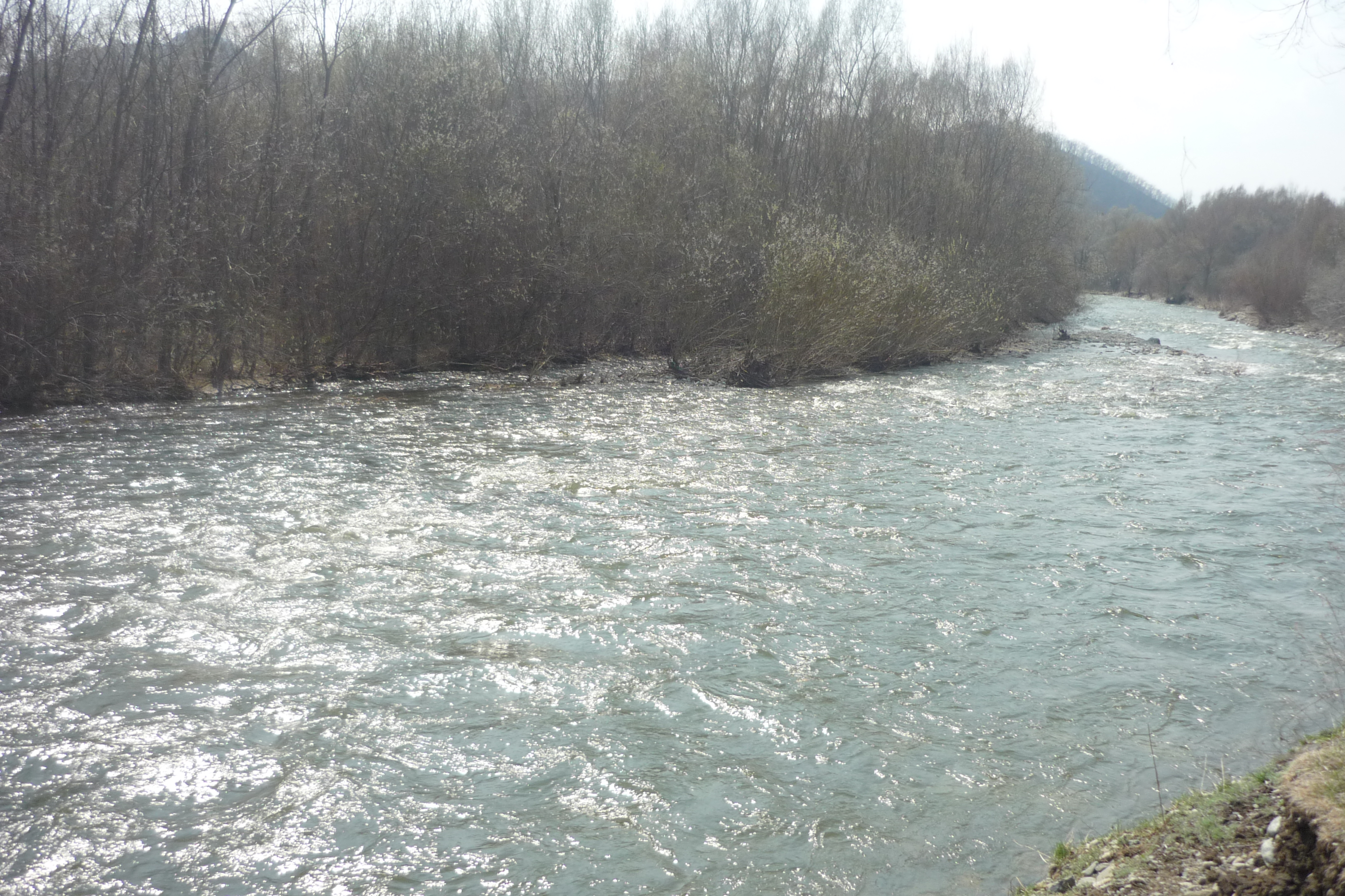 Vodopadnaya River near Nikolayevka in May 1, 2010